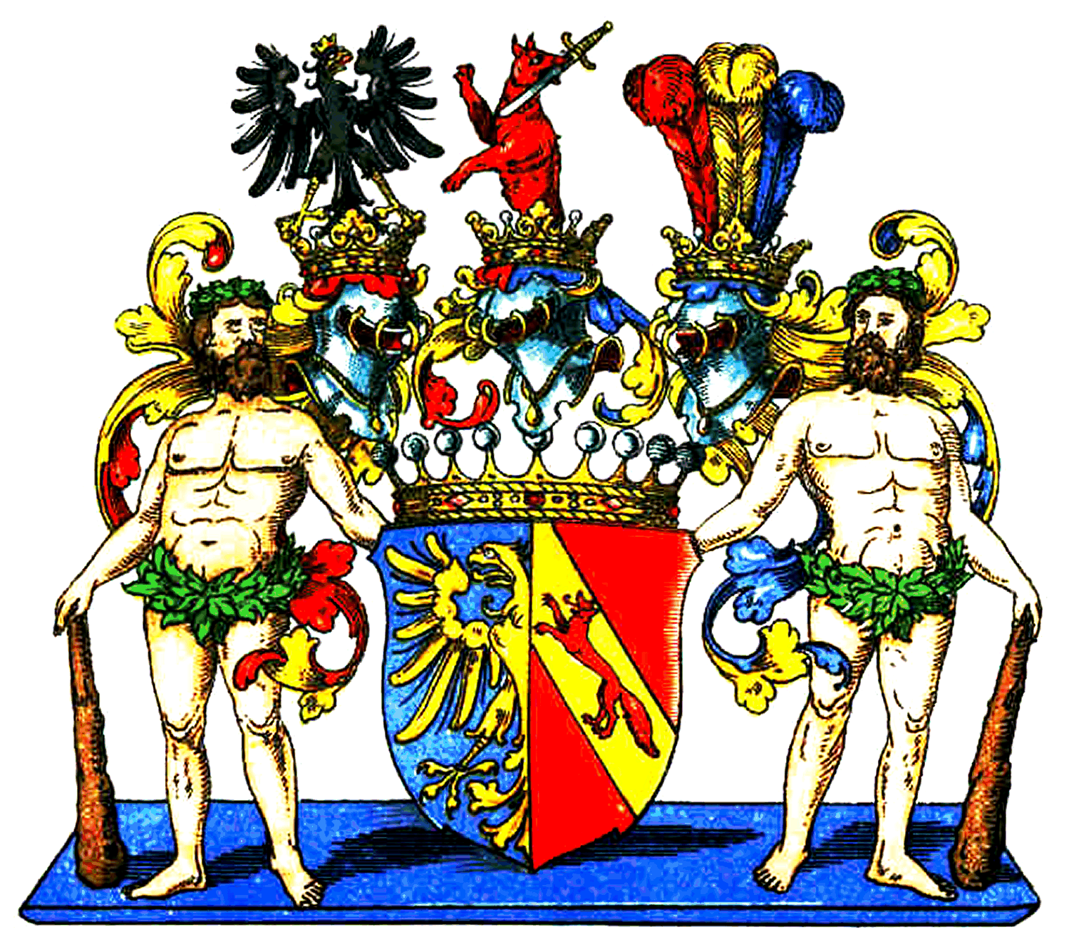 Wappen derer von Saurma-Ruppersdorf